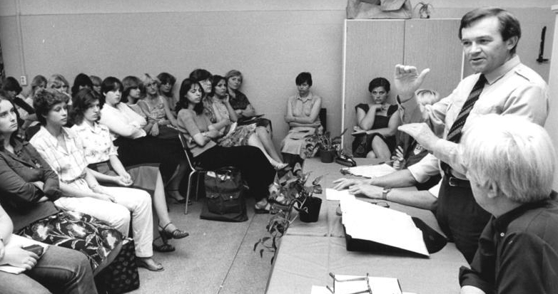 ADN-ZB/Settnik-25.5.81-Abgeordneter Berlin: Auf einem Erstwählerforum in der medizinischen Fachschule des Städtischen Krankenhauses Berlin-Friedrichshain stellte sich Prof.Dr.sc.med. Burkhard Schneeweiß (2.v.r.) als Kandidat für die Volkskammer vor. Er ist Chefarzt der Kinderklinik des Krankenhauses und Mitglied der CDU. Er gehört zu den sieben zu wählenden Abgeordneten des Wahlkreises 2 der Hauptstadt der DDR, die mit dem gemeinsamen Wahlvorschlag der Nationalen Front der DDR für die Wahlen zur Volkskammer am 14. Juni 1981 vorgestellt werden.